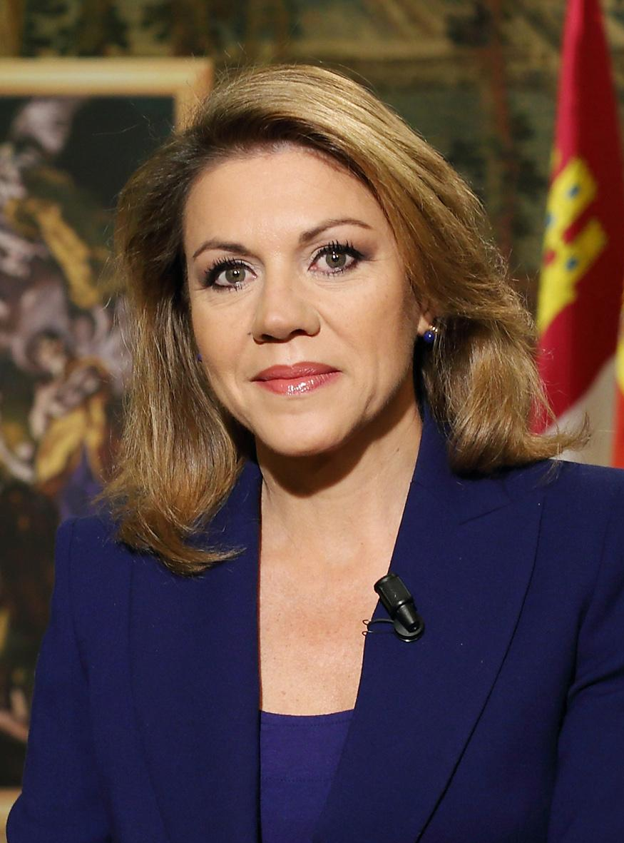 Cospedal. Mensaje de Navidad